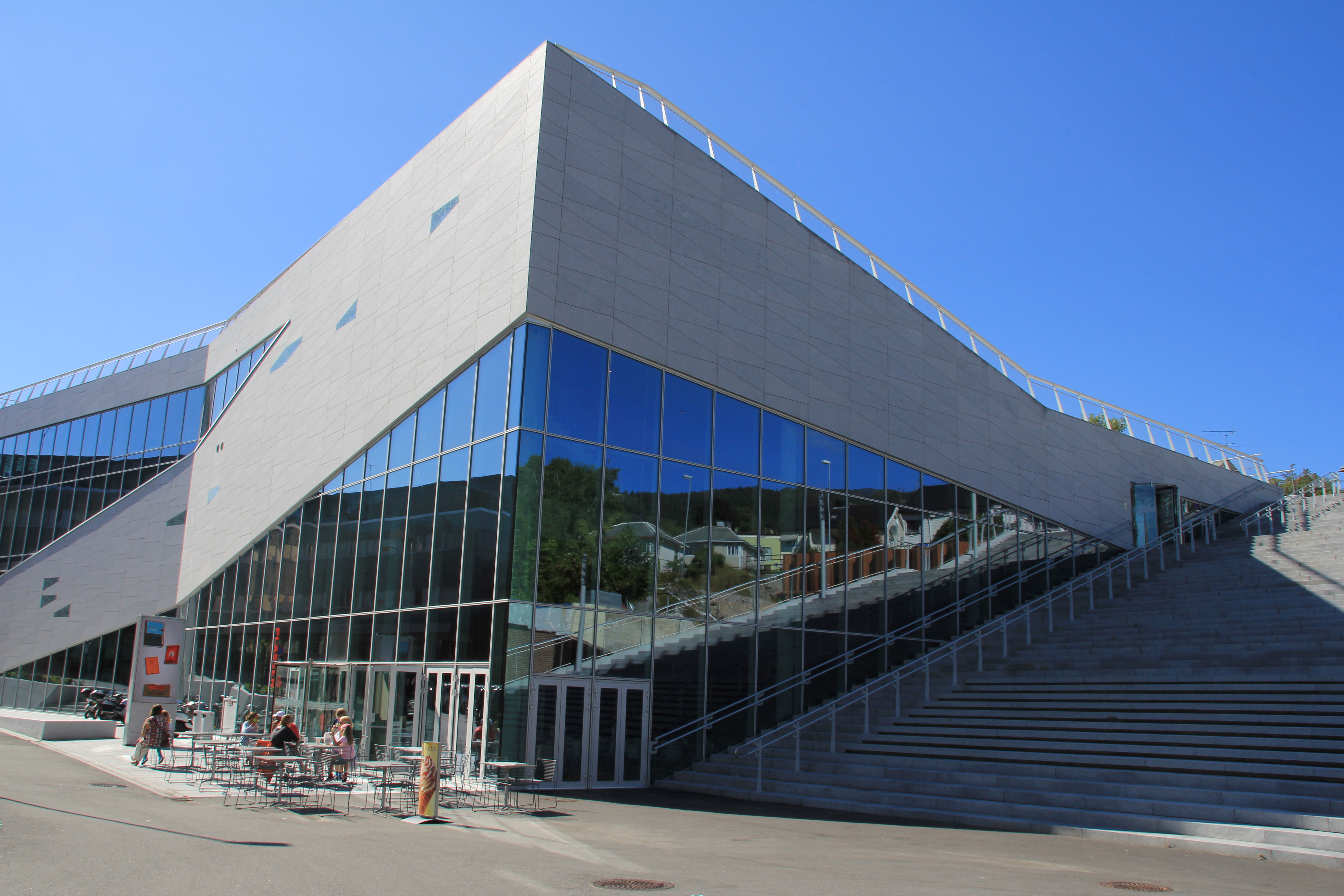 Molde bibliotek holder til i kulturbygget Plassen midt i Molde sentrum.